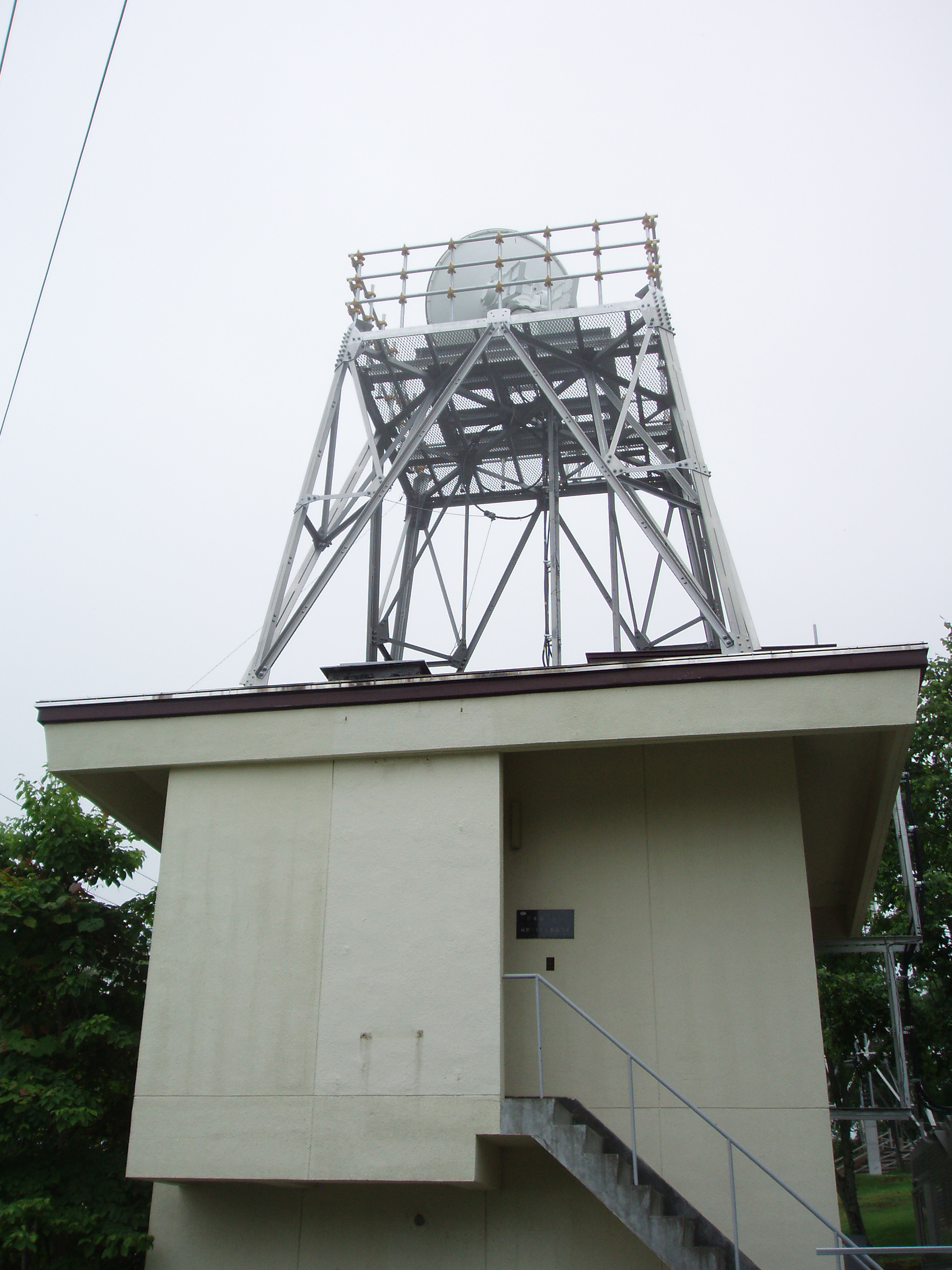 北海道大学 気象観測用レーダー（旧 NHK紋別中継局）